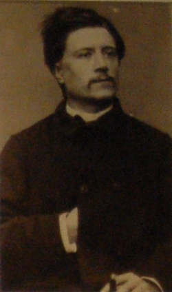 Charles Amouroux, membre de la Commune de Paris (1871). Cliché pris à l'occasion de l'exposition "La Commune 1871, Paris capitale insurgée" à l'Hôtel de ville de Paris le 5 avril 2011.